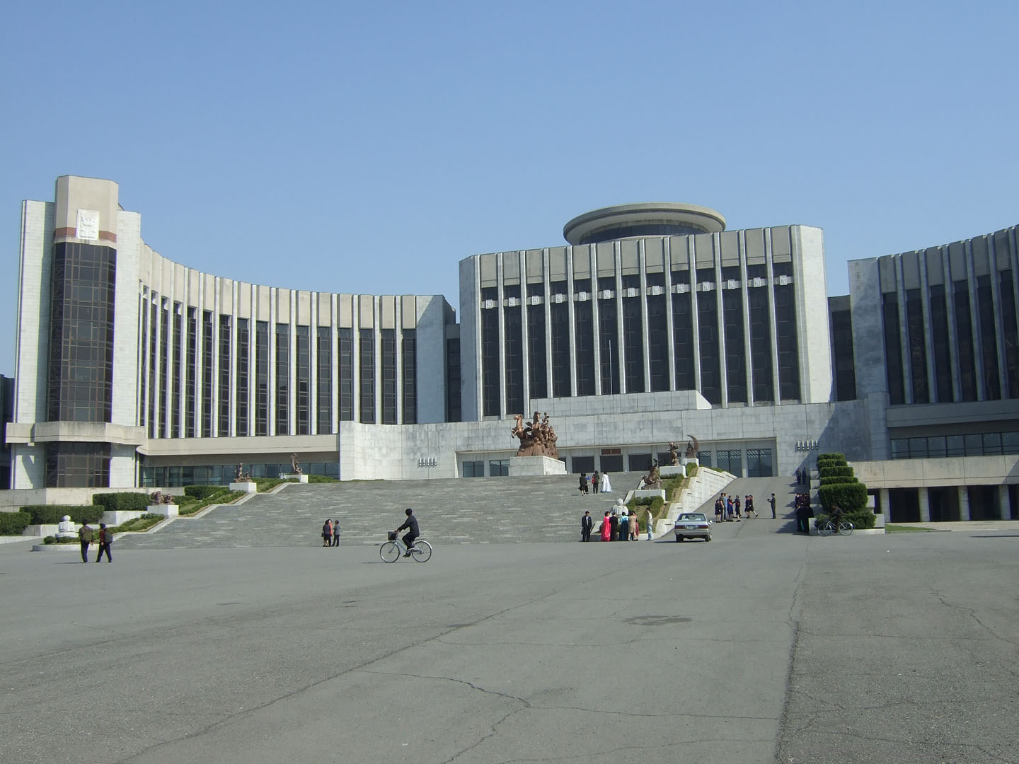 Mangyondae Schoolchildrens Palace in Pyongyang